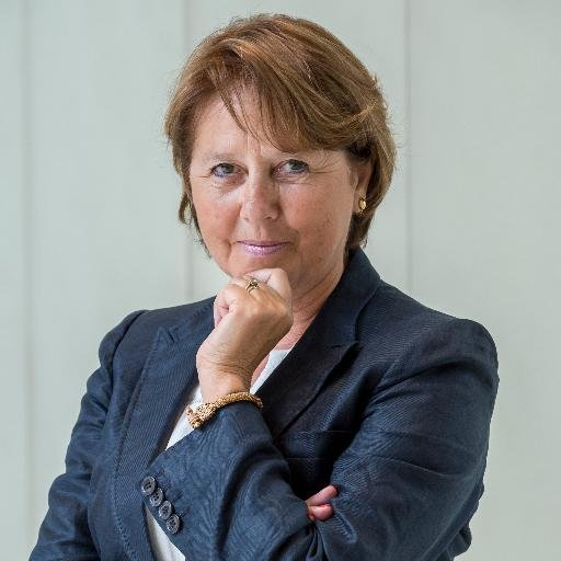 Patricia Adam, présidente de la commission de la défense nationale et des forces armées